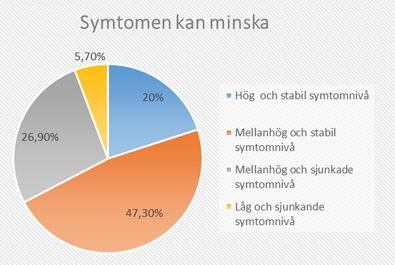 Cirkeldiagram över fyra grupper med olika symtomutveckling